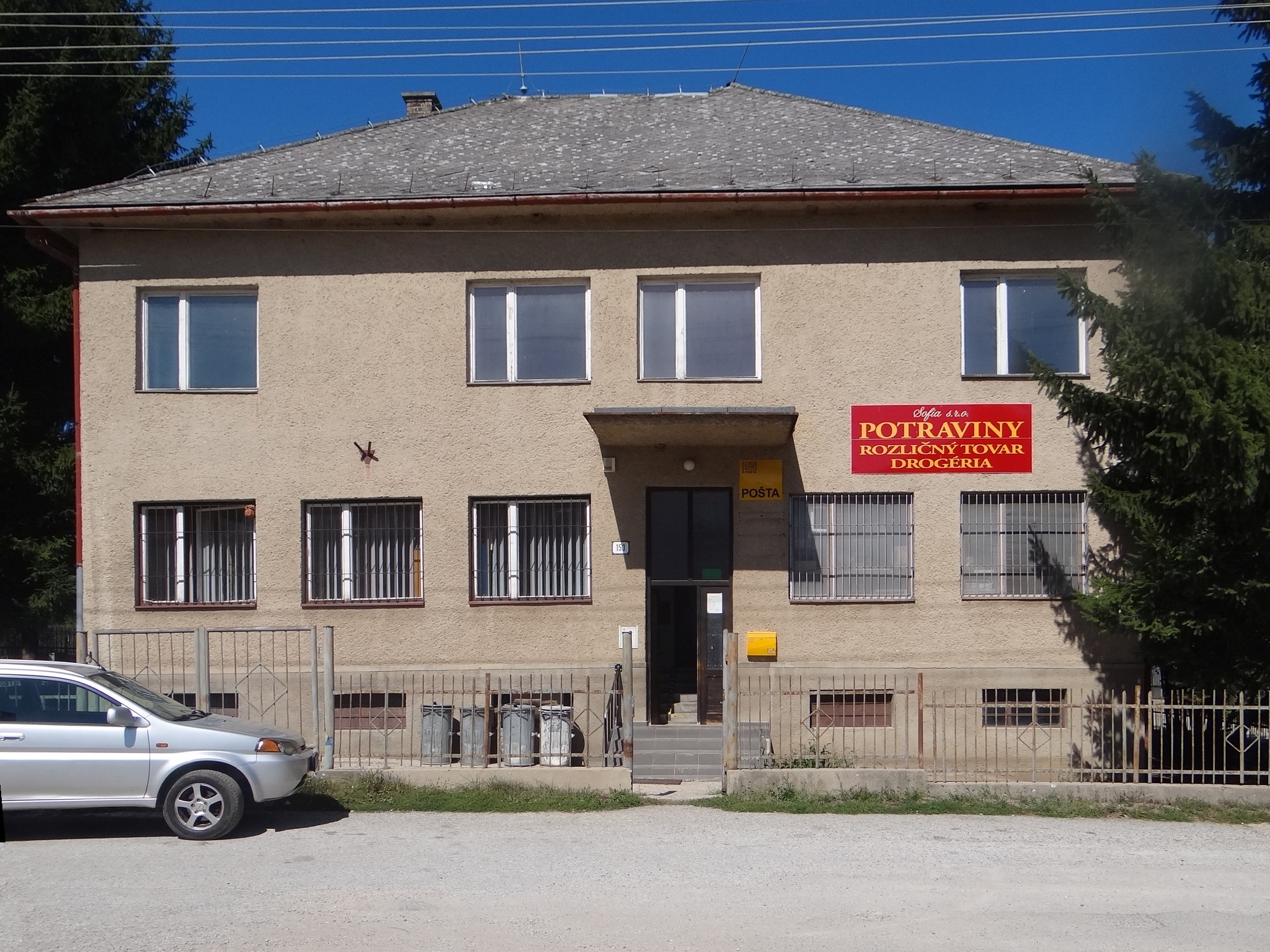 Rožňavské Bystré